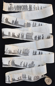 Tira de gravats en fila de la processó de Setmana Santa